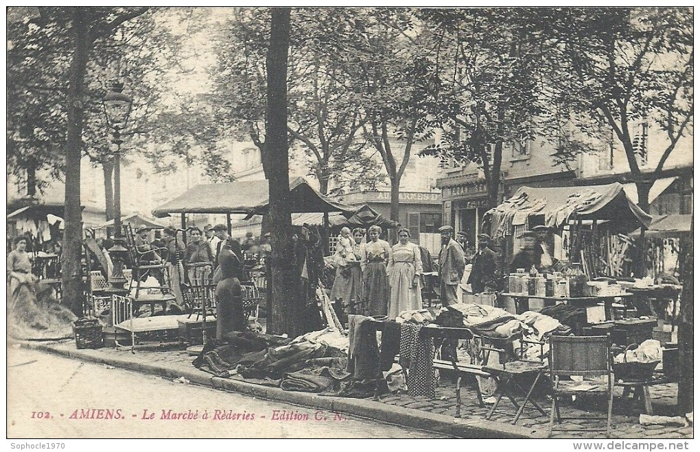 Réderie à Amiens dans les années 1910